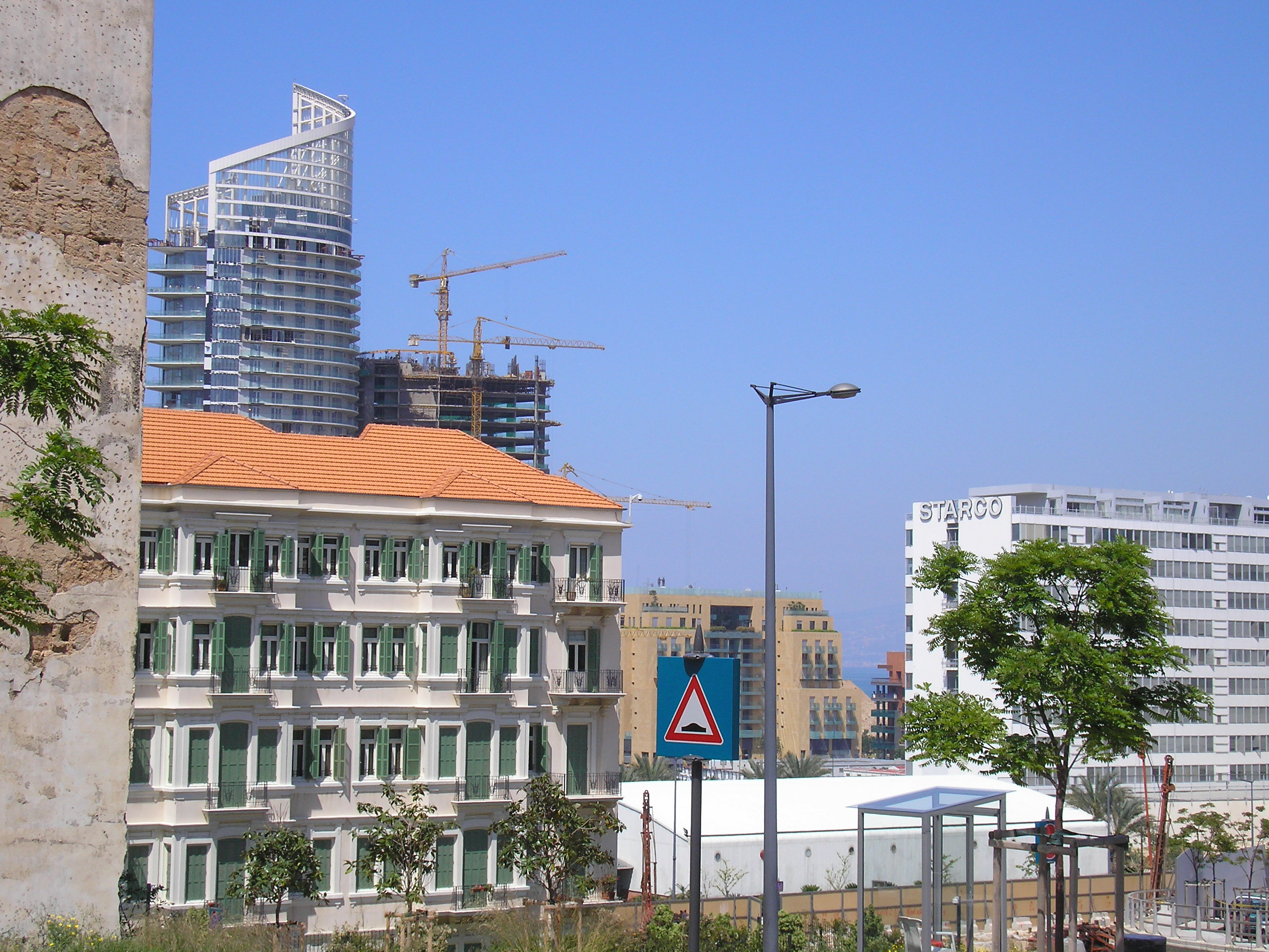 Description : Le Centre-Ville et les Marina tours. Auteur : Mr Sadek Radi